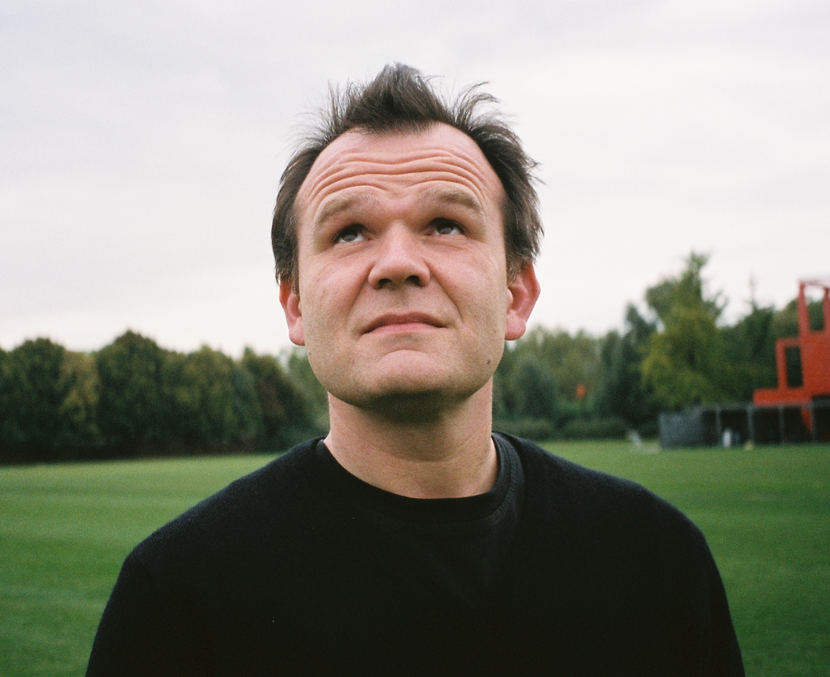 Le chef d'orchestre français François-Xavier Roth en 2009.